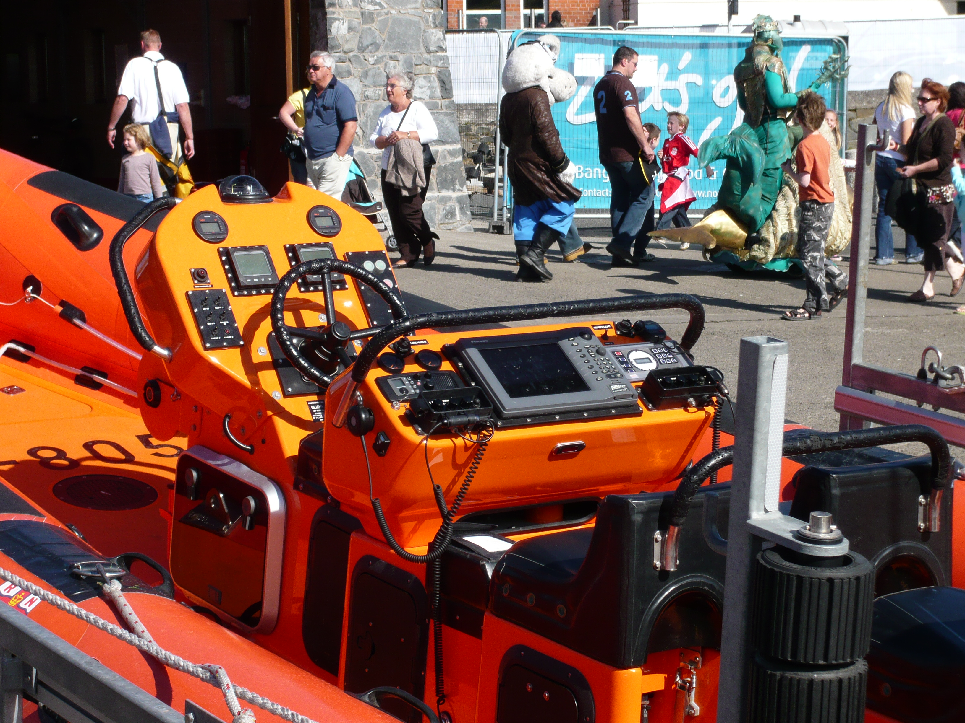 Lifeboat controls